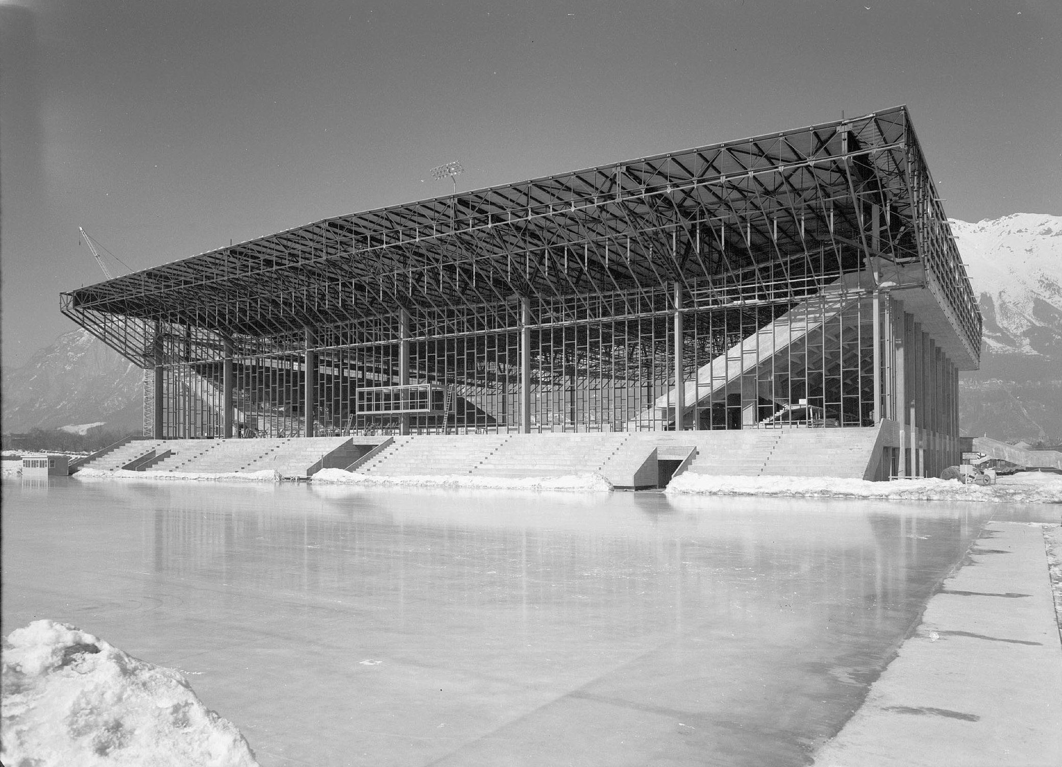 Kunsteisstadion am Tivoli